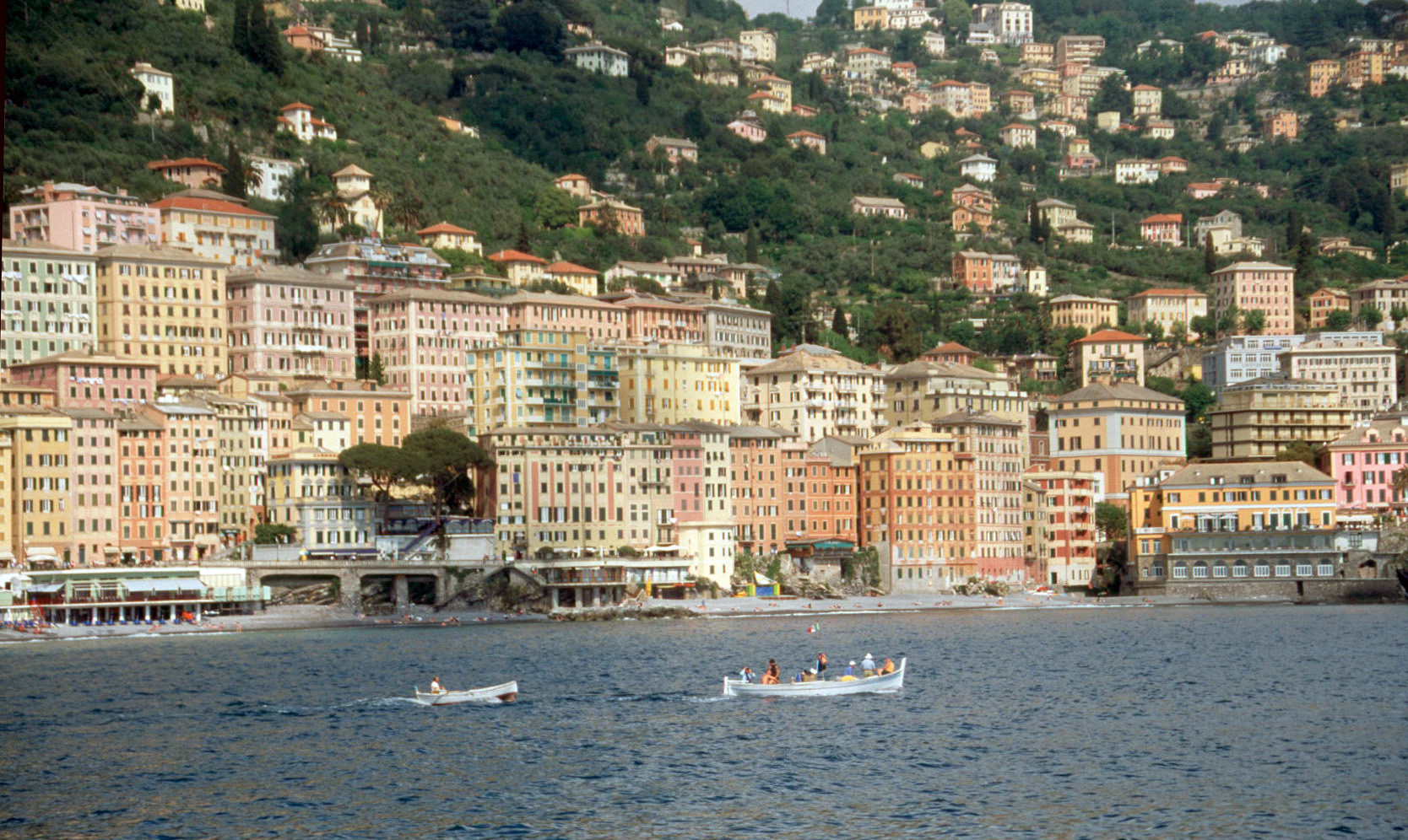 Camogli 2004